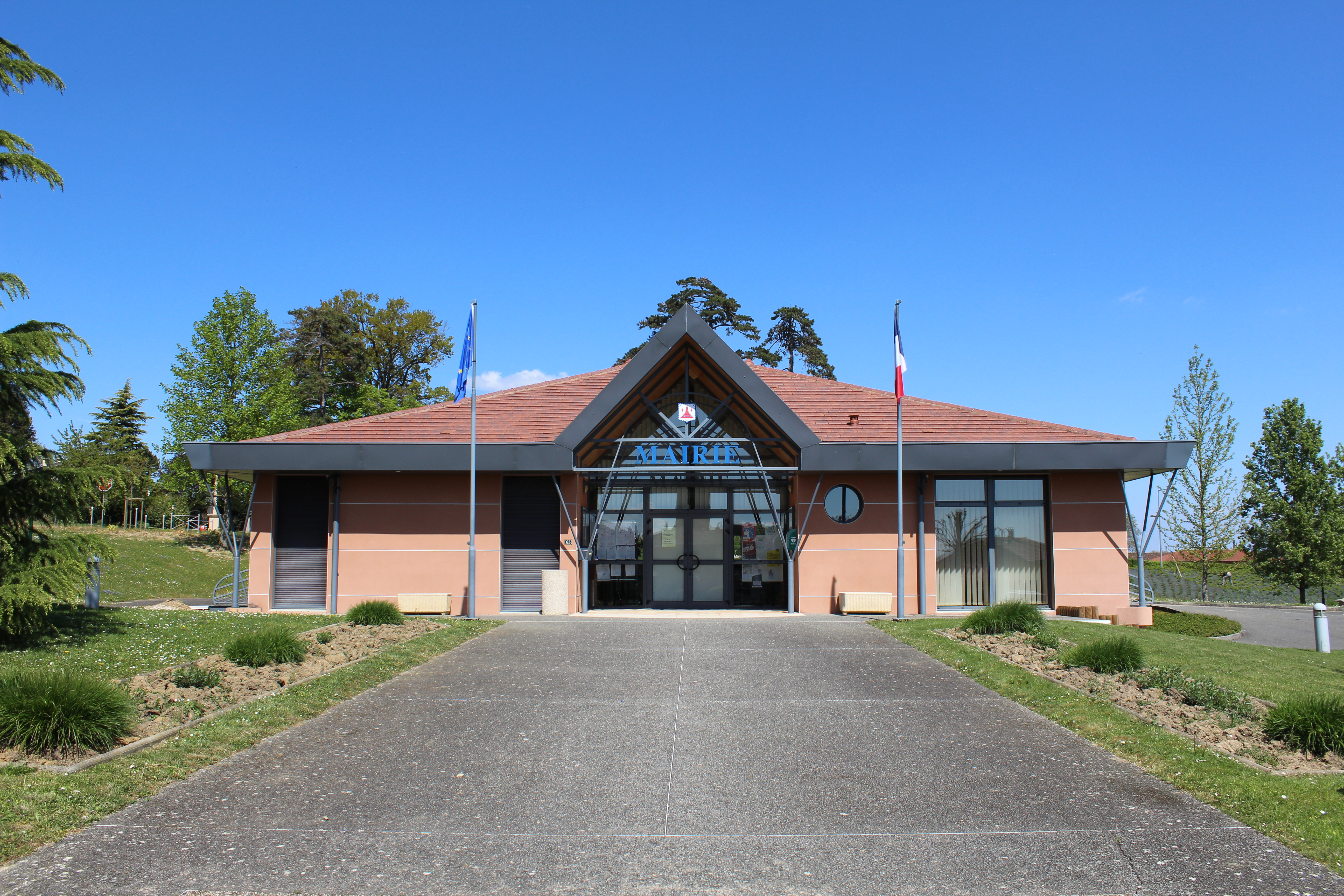 Mairie de Saint-Cyr-sur-Menthon